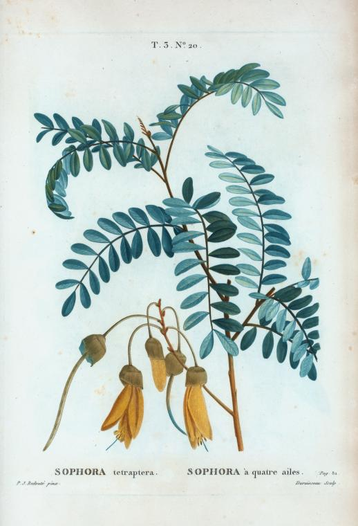 Sophora tetraptera = Sophora à quartre ailes.